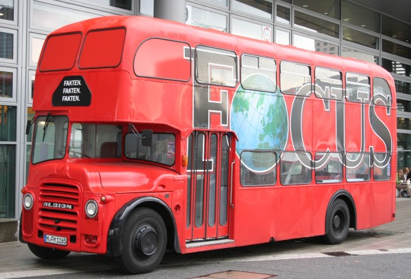 Jedes Jahr zur Buchmesse steht ein Focus-Bus auf dem Frankfurter Messegelände